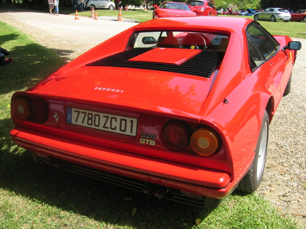 Ferrari 328